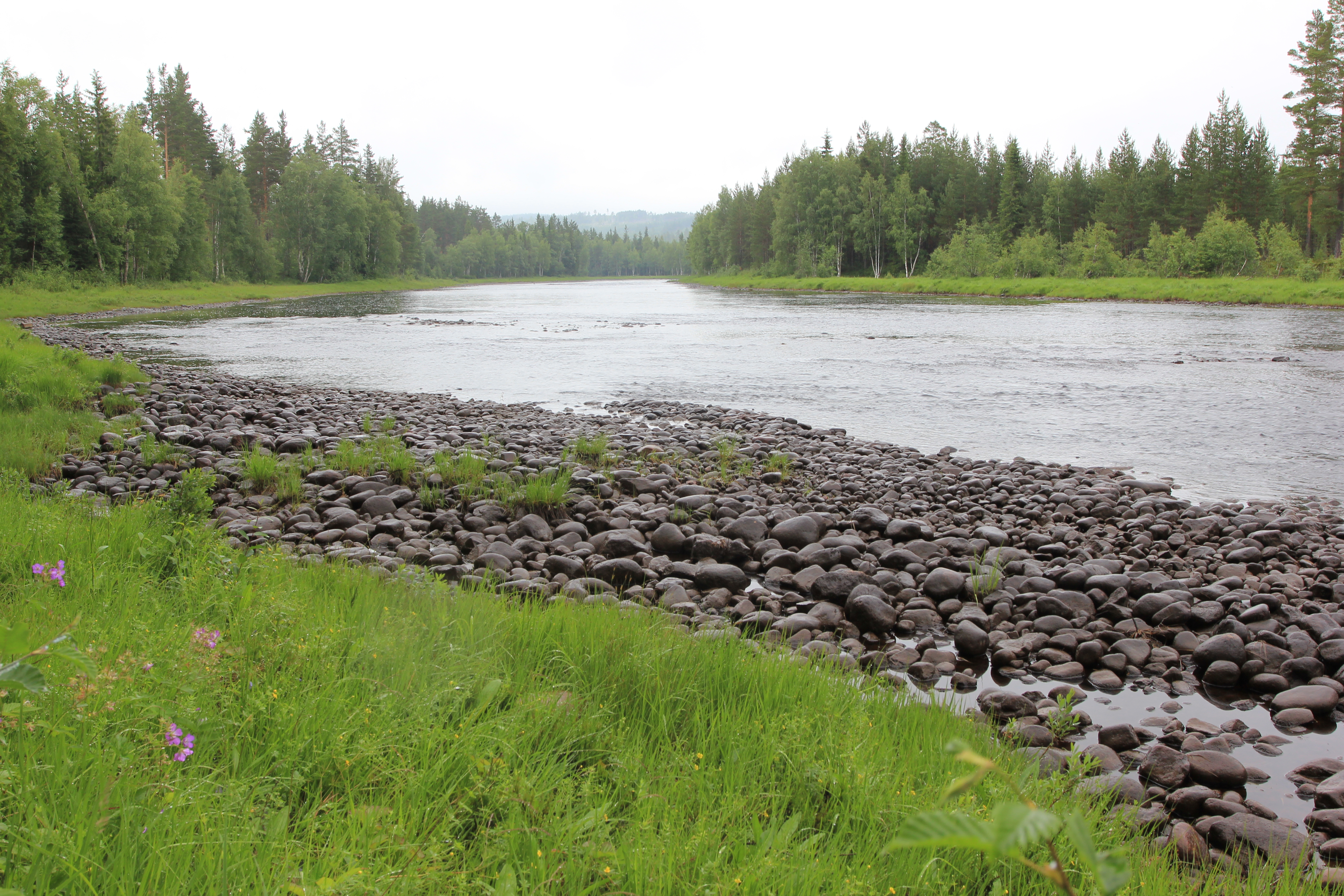 Ore älv mellan Furudal och Noppikoski, inte långt från Furudals bruk